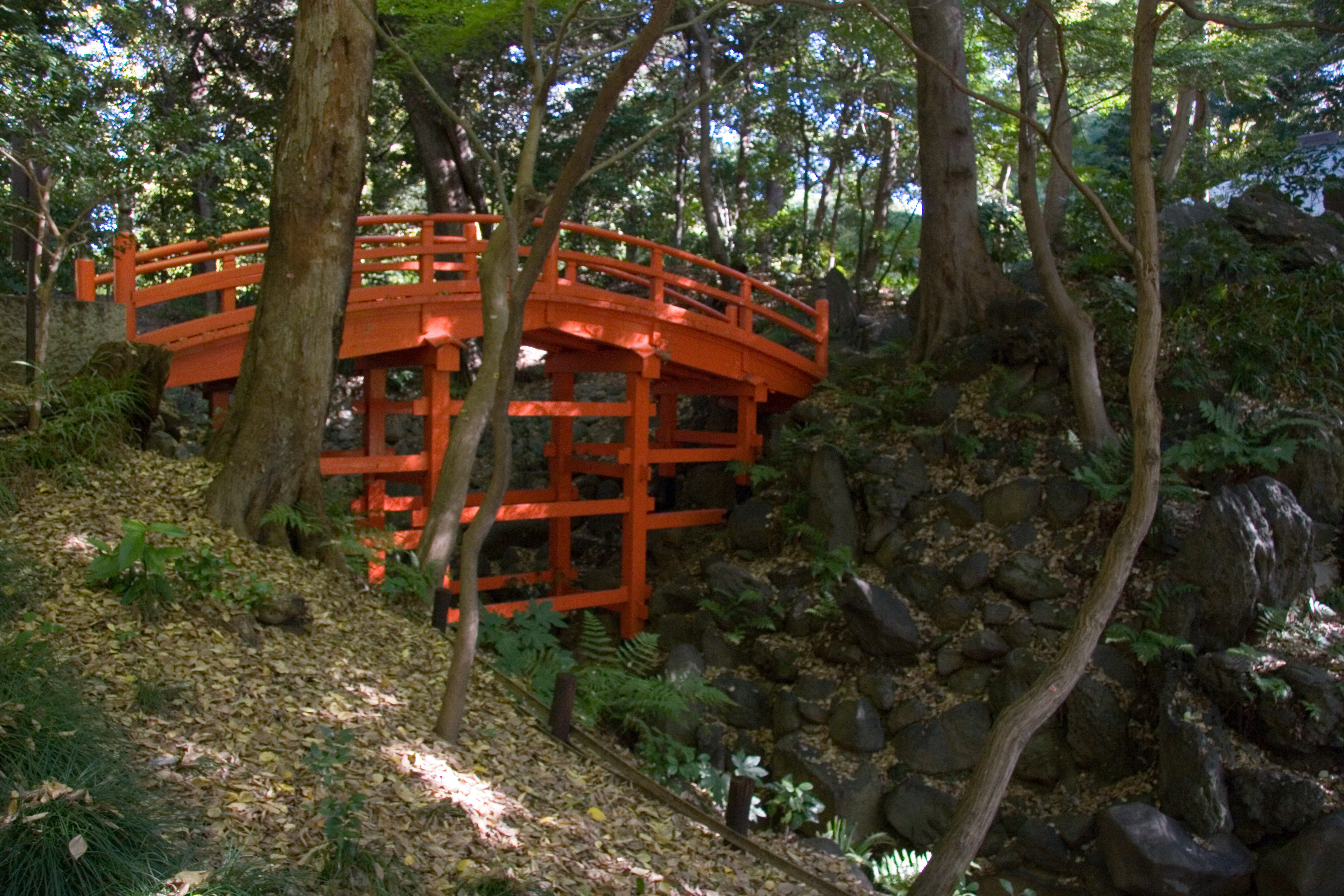 Koichikawa Korakuen garden (Tokyo, Japan) - Tsutenkyo bridge